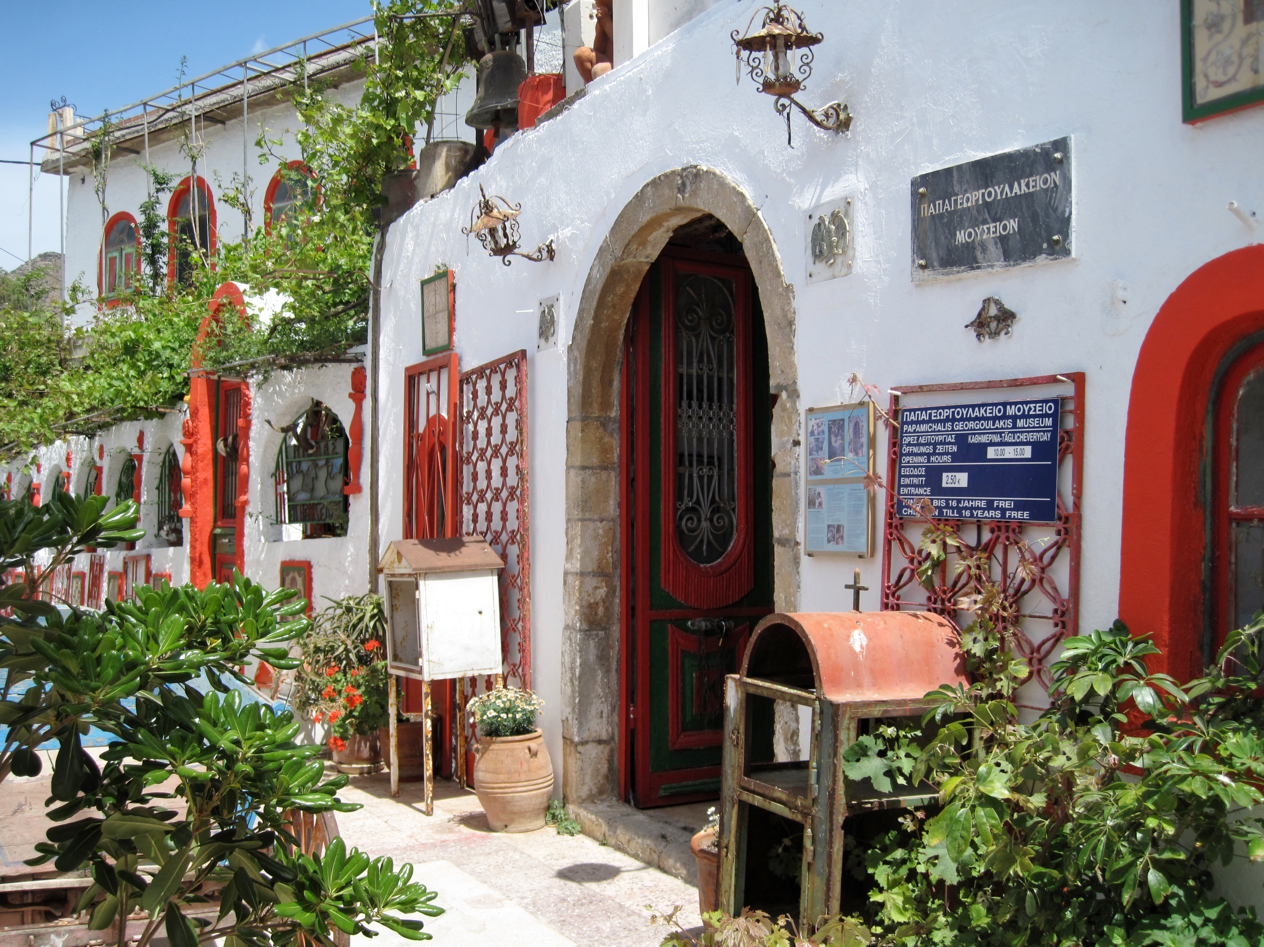 Papageorgoulakio-Heimatmuseum in Asomatos, Gemeinde Agios Vasilios, Regionalbezirk Rethymno, Kreta, Griechenland